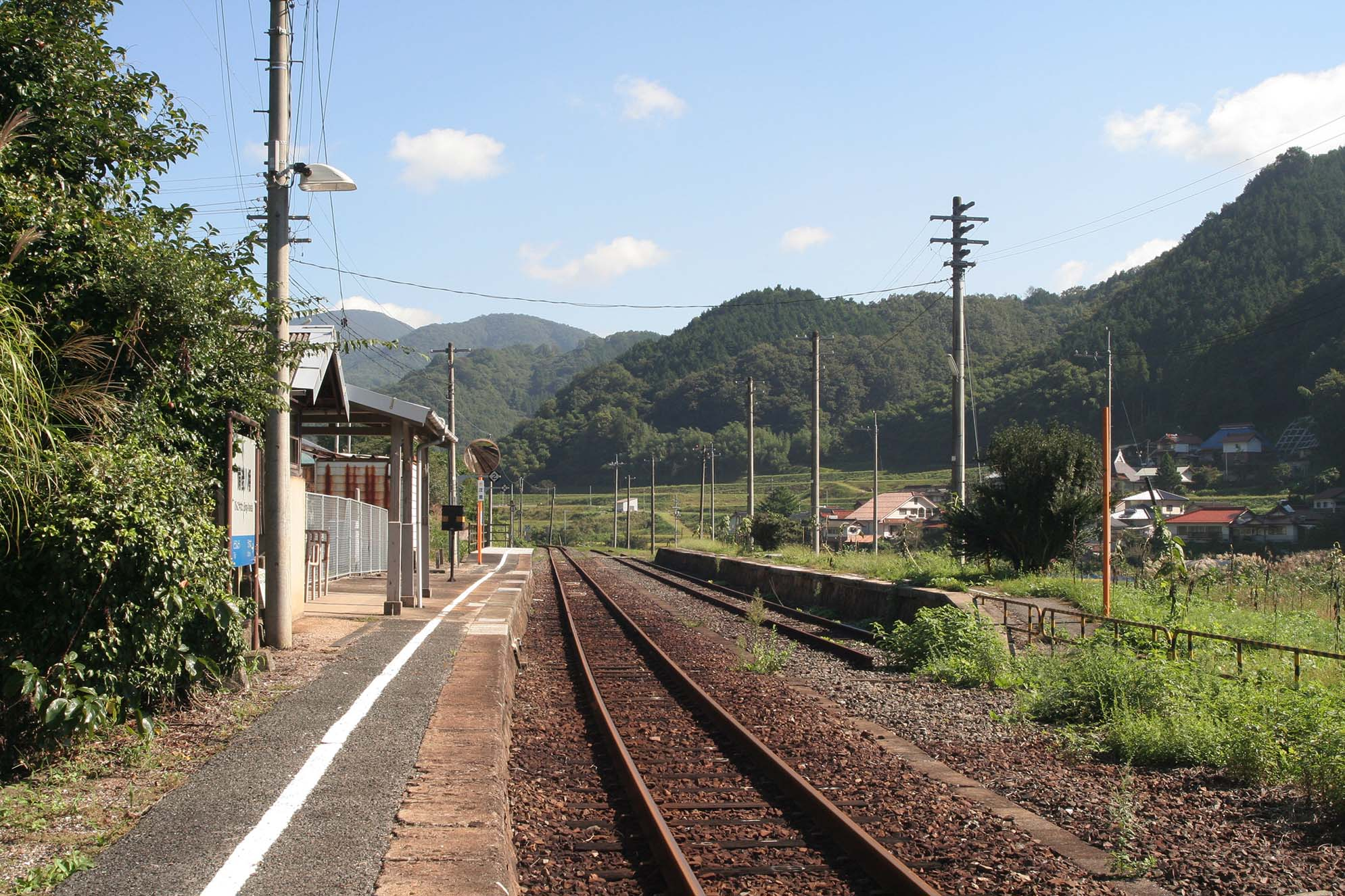 西日本旅客鉄道 備後八幡駅の構内